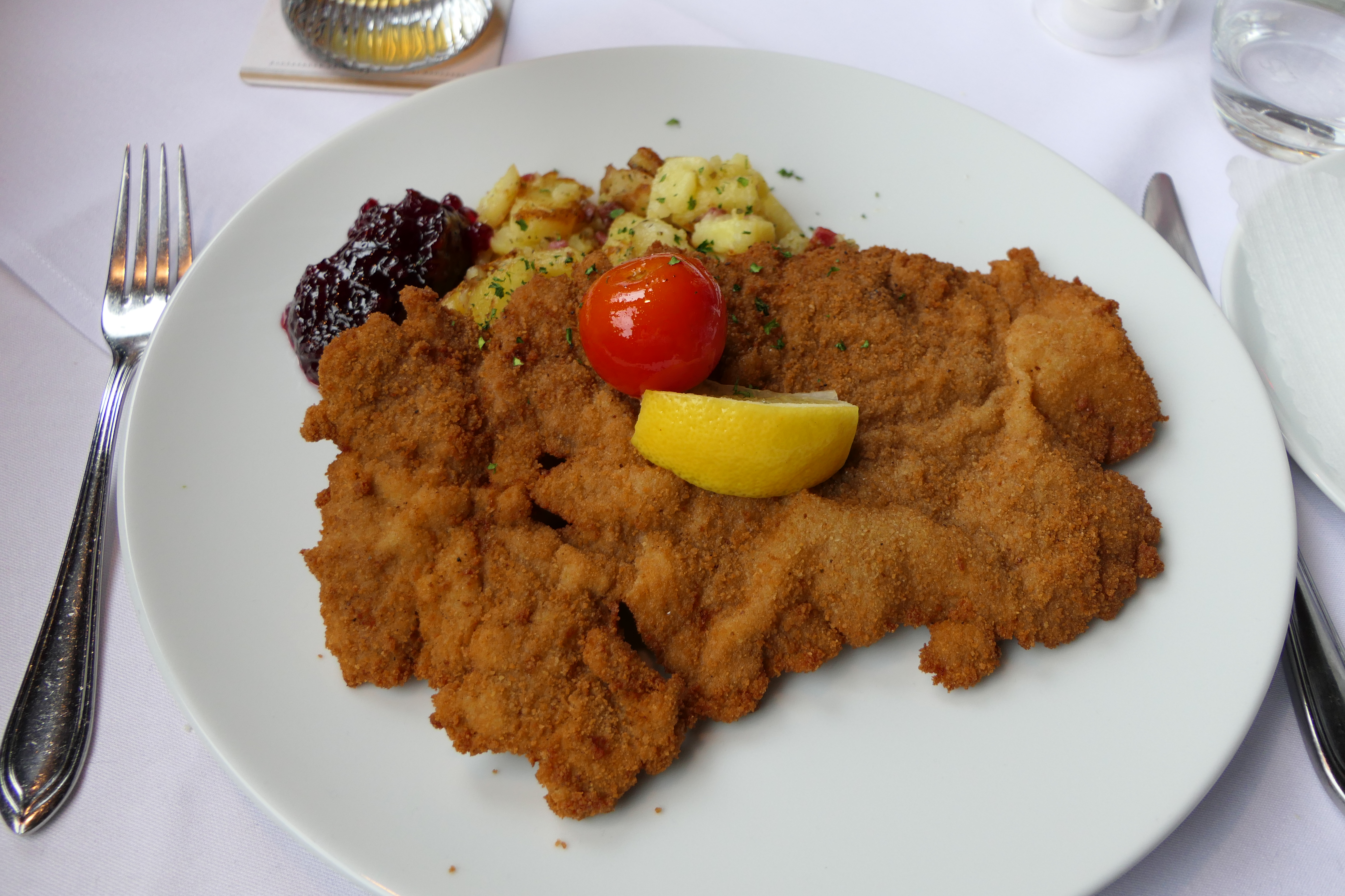 Wiener Schnitzel mit Preiselbeeren, Zitrone und Tomate sowie Bratkartoffeln, Elbterrasse Wachwitz, Dresden